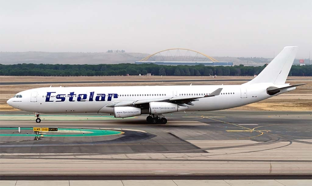 Airbus A340 Aerolíneas Estelar en Madrid